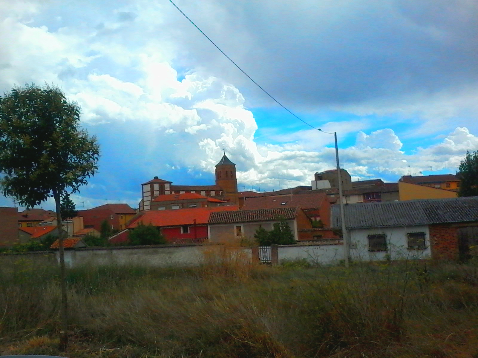 Valdevimbre, León